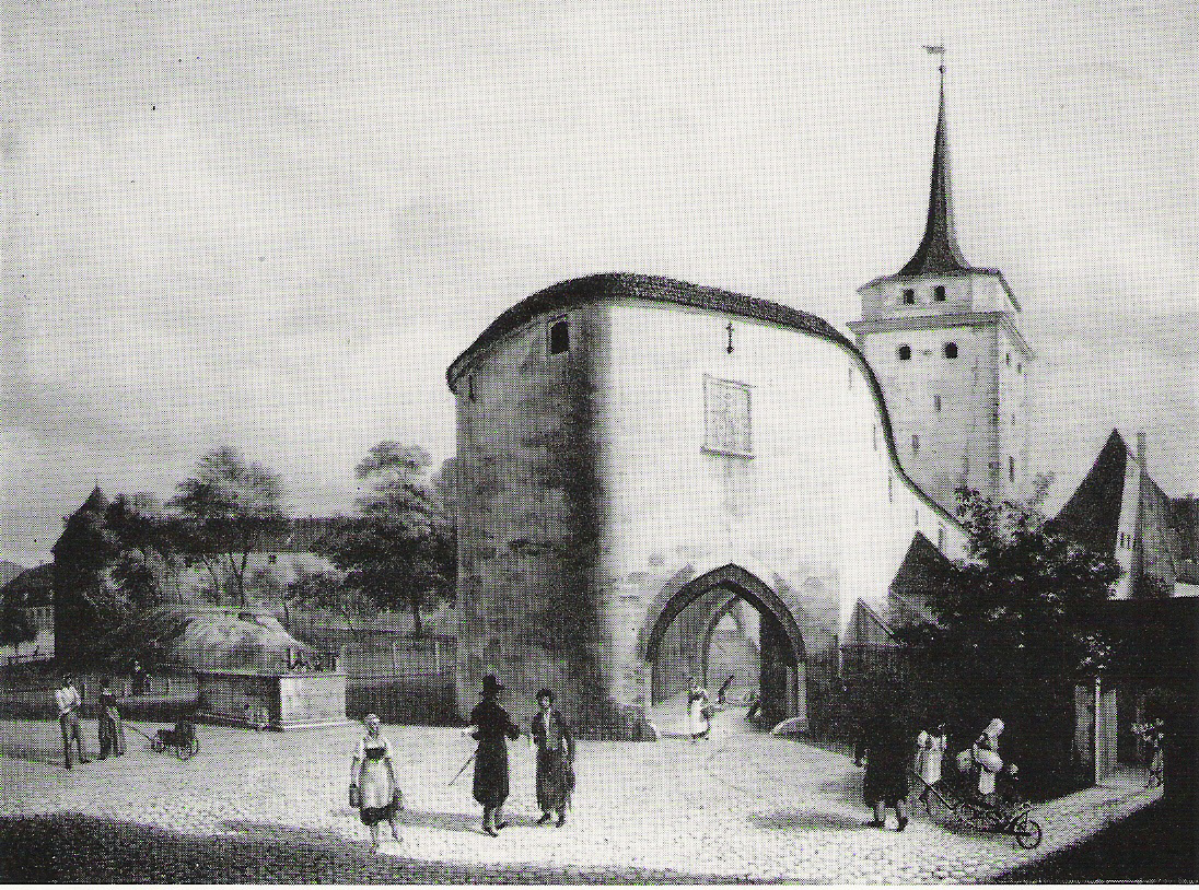 Bautzen, das Schülertor um 1839.